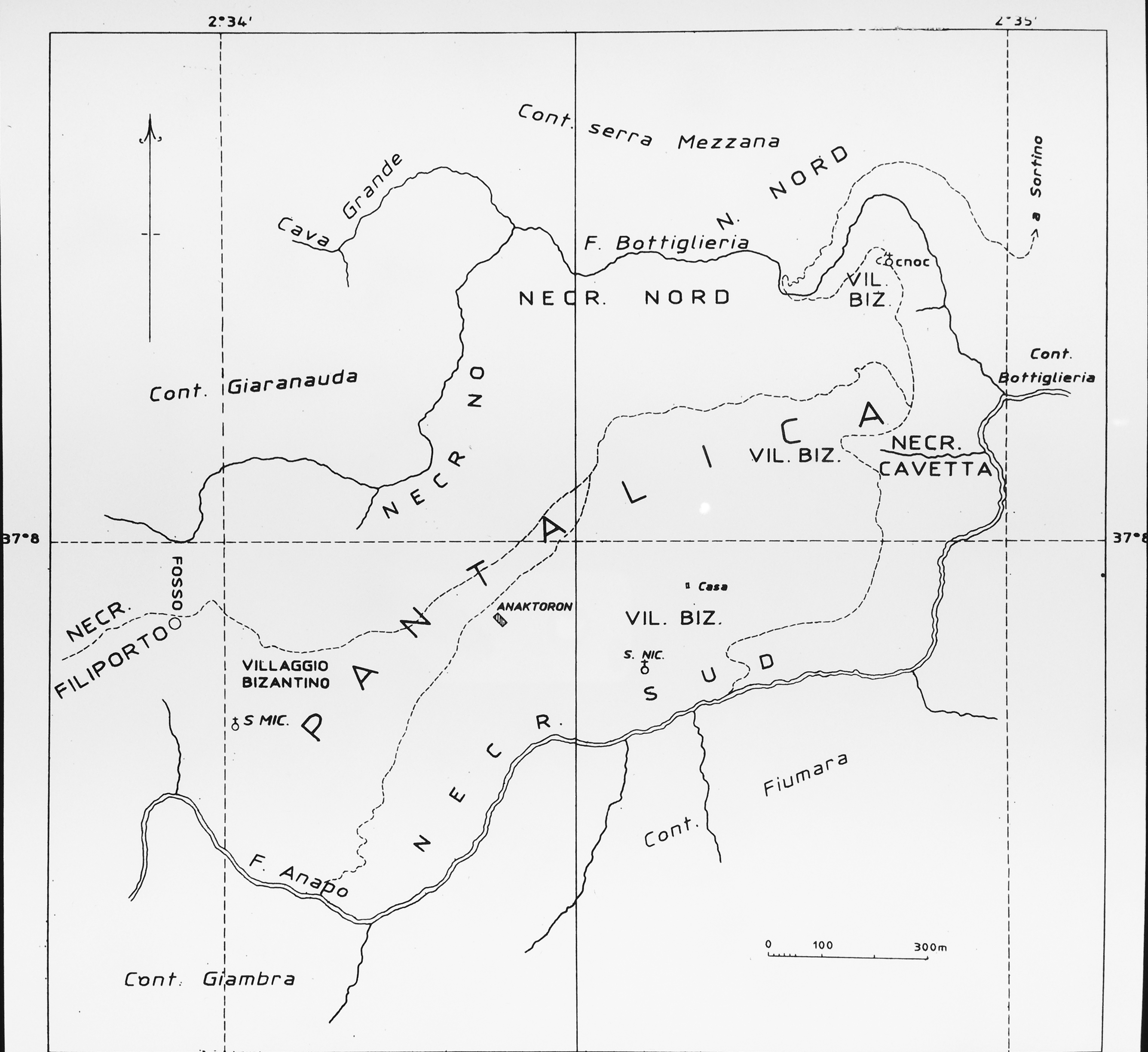 Mappa di Pantalica presso il Museo Paolo Orsi (SR)